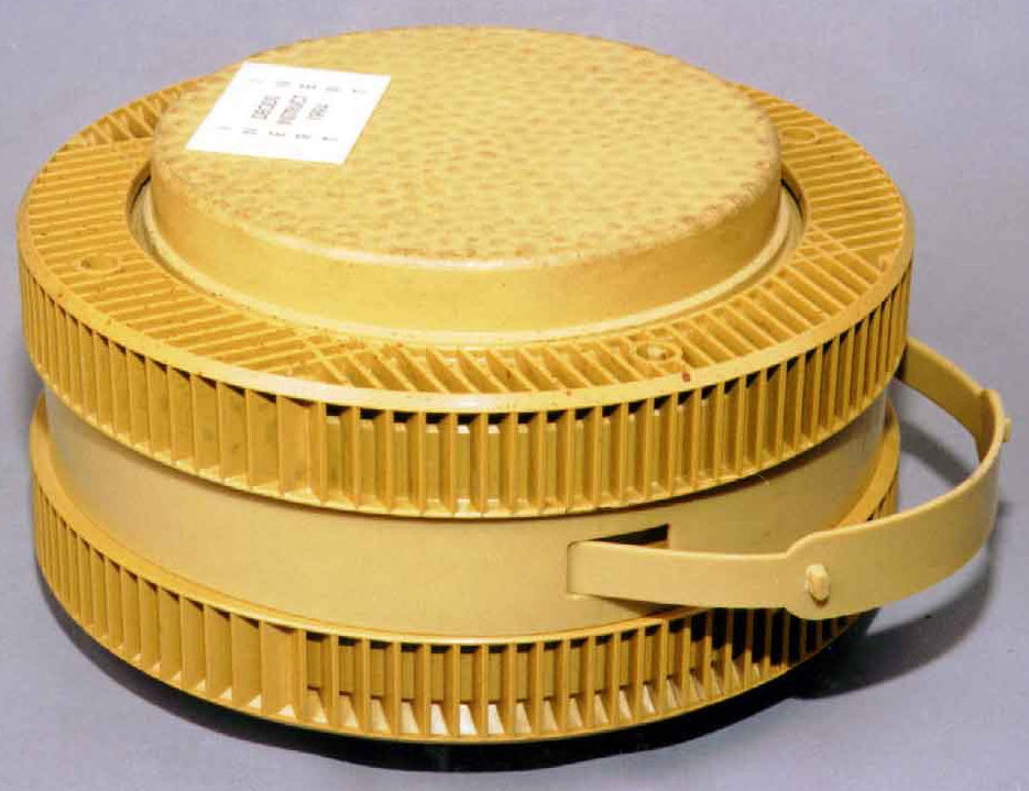 An Italian TC/2.4 anti-tank landmine.